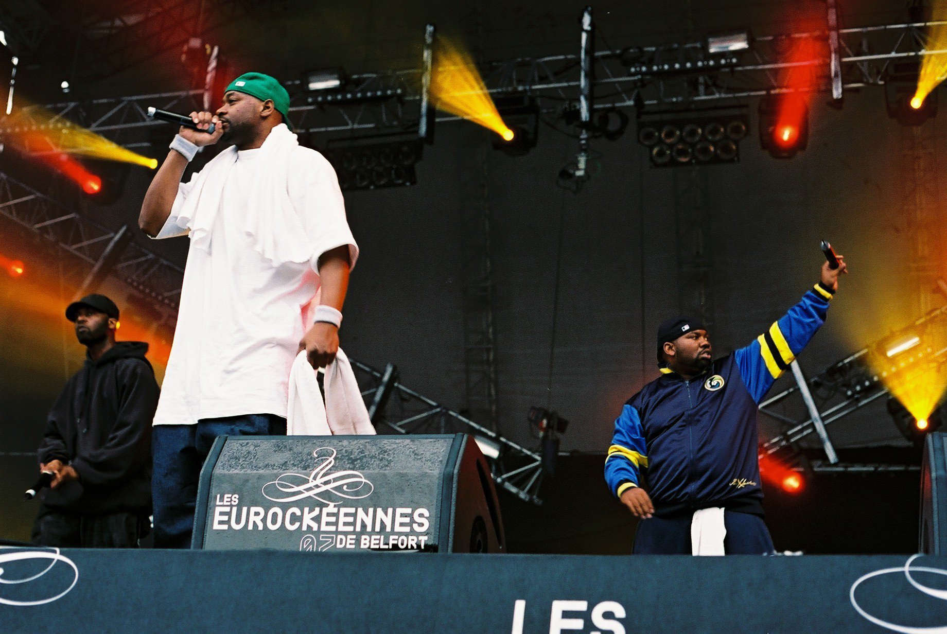 Wu-Tang Clan - Eurockéennes 07